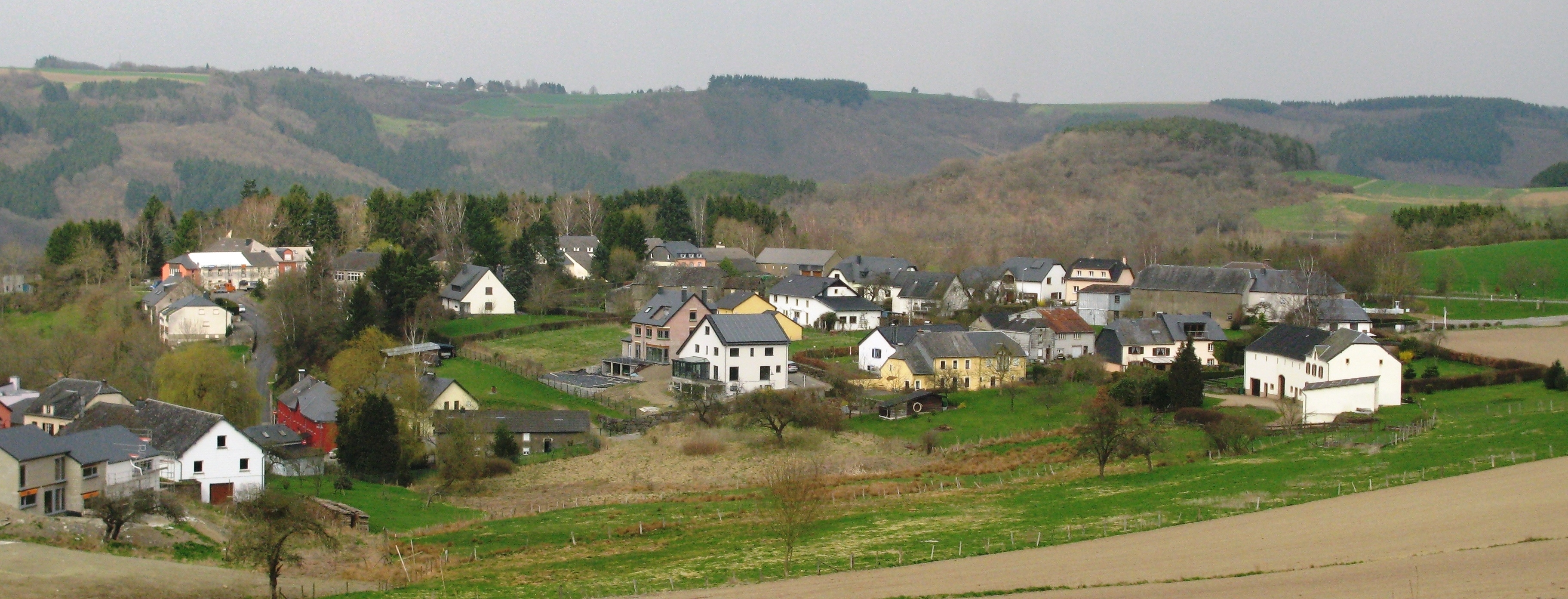 Vue op Bommel.